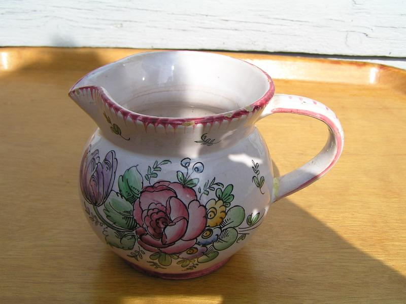 Faïence Charentaise décor traditionnel Renoleau